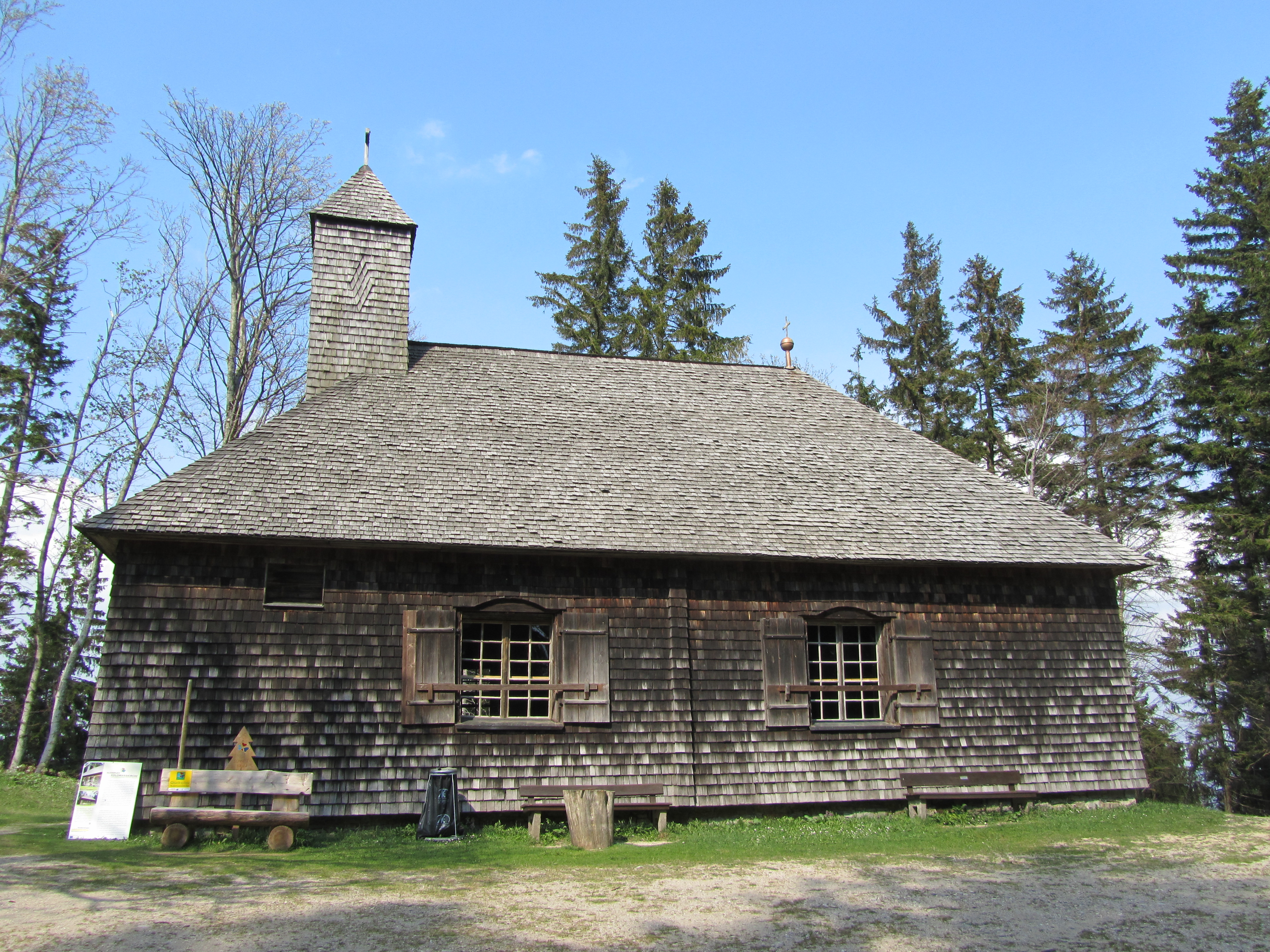 Kath. Filialkirche St. Koloman, Kolomansberg